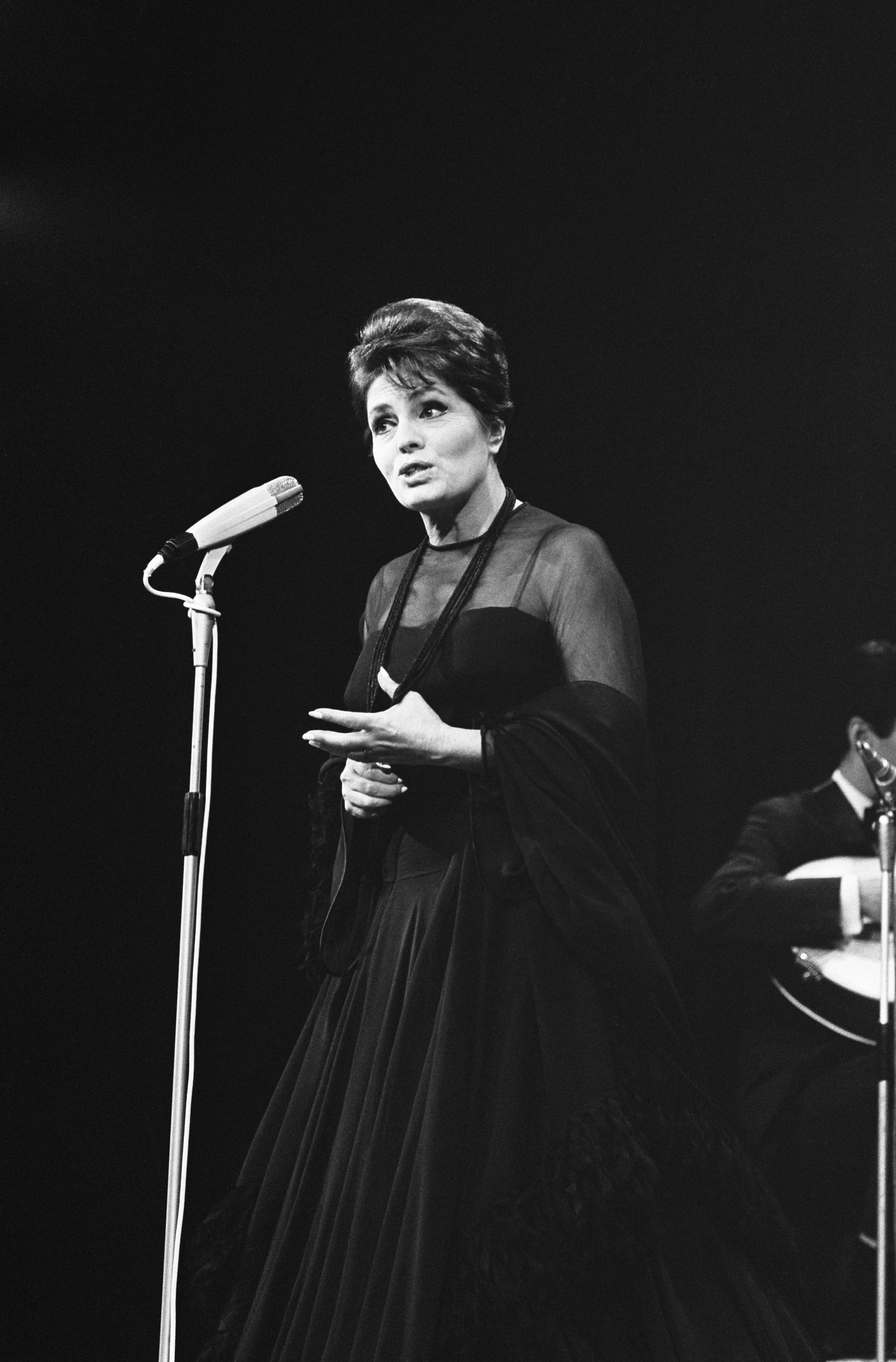 Collectie / Archief : Fotocollectie Anefo Reportage / Serie : Grand Gala du Disque Populaire in Congrescentrum Beschrijving : Amalia Rodrigues Datum : 7 maart 1969 Trefwoorden : muziek, zangeressen Persoonsnaam : Rodrigues, Amalia Fotograaf : Fotograaf Onbekend / Anefo Auteursrechthebbende : Nationaal Archief Materiaalsoort : Negatief (zwart/wit) Nummer archiefinventaris : bekijk toegang 2.24.01.05 Bestanddeelnummer : 922-1813